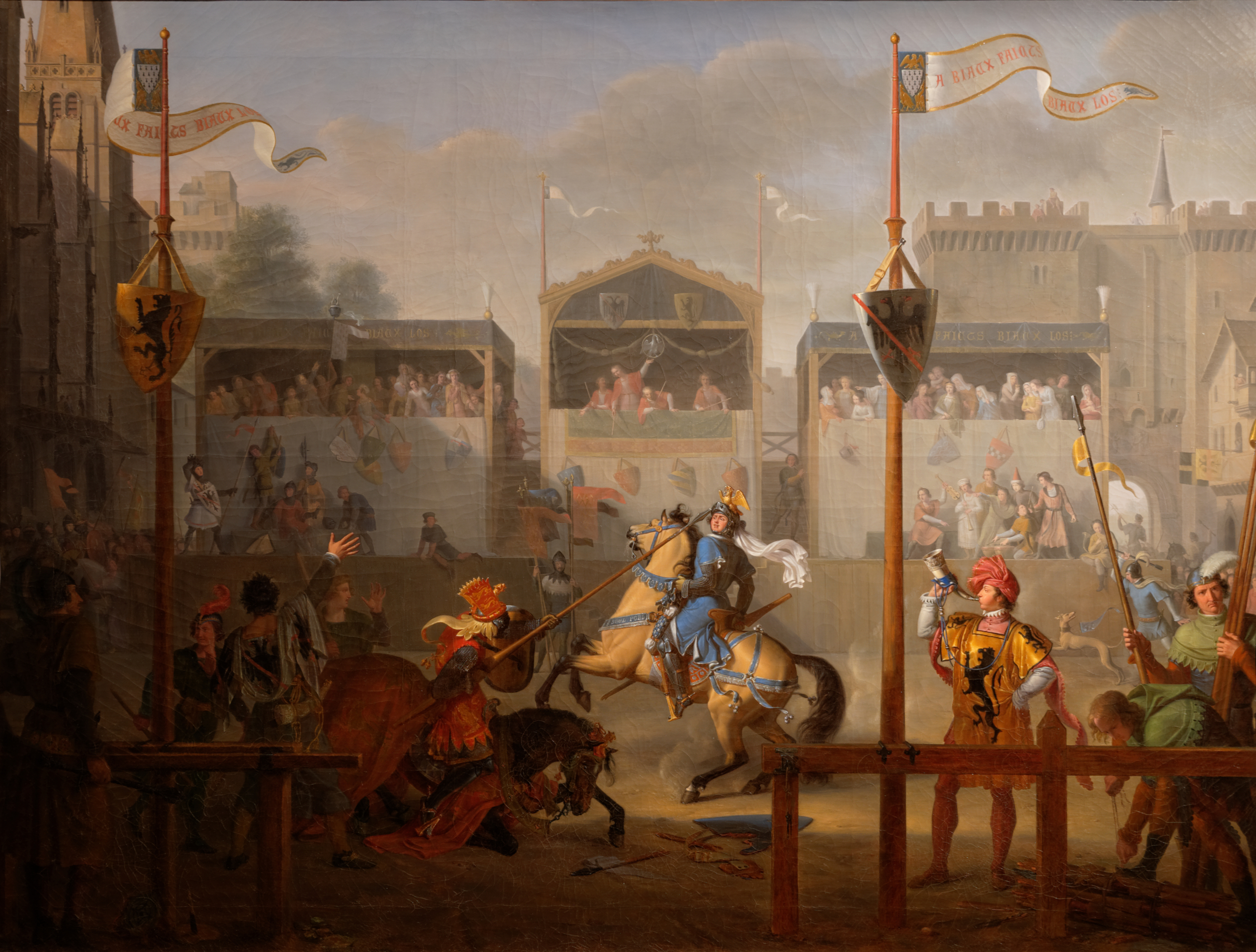 Lors d'une joute à Rennes en 1337, un chevalier inconnu triomphe de tous ses adversaires, l'un d'eux parvient à soulever la visière de son heaume. Il s'agit de Bertrand Du Guesclin, à qui son père avait interdit de participer à ce tournoi